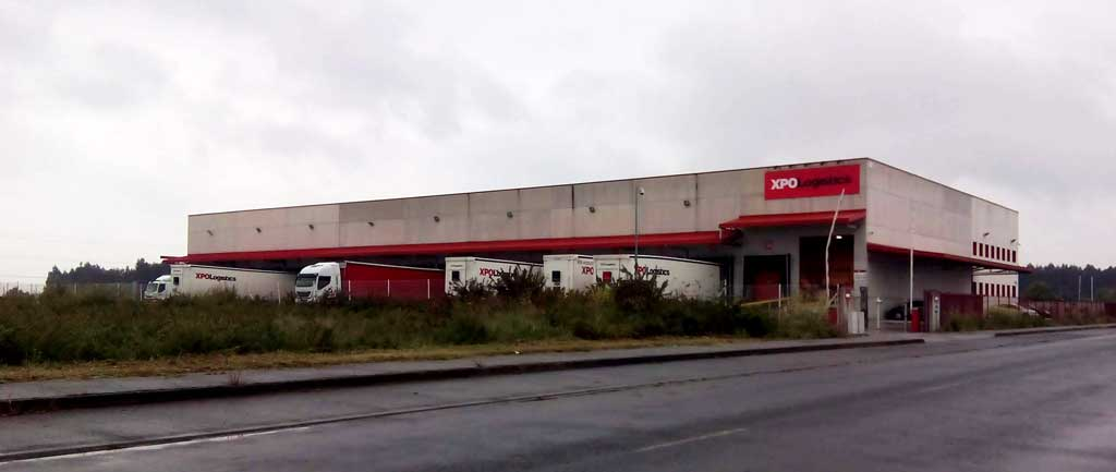 Instalacións de XPO Logistics en Curtis, A Coruña, Galiza, Spain.